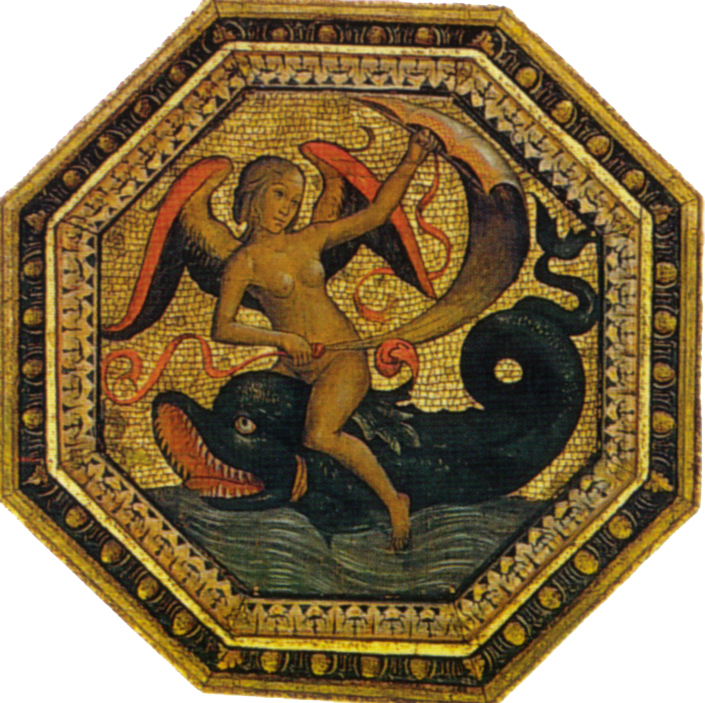 Pinturicchio, soffitto dei semidei, 1490, roma, palazzo dei penitenzieri 02 fortuna